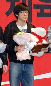 제17회 코카콜라 체육대상 시상식